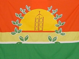 Bandera del Municipio Miranda Edo. Carabobo